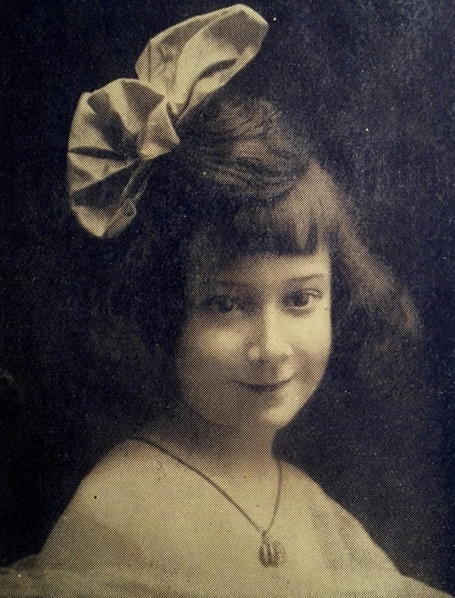 Programme officiel de la "Tournée TRAMEL - Le Crime du Bouif", page 10, 1924-1926, 12 pages